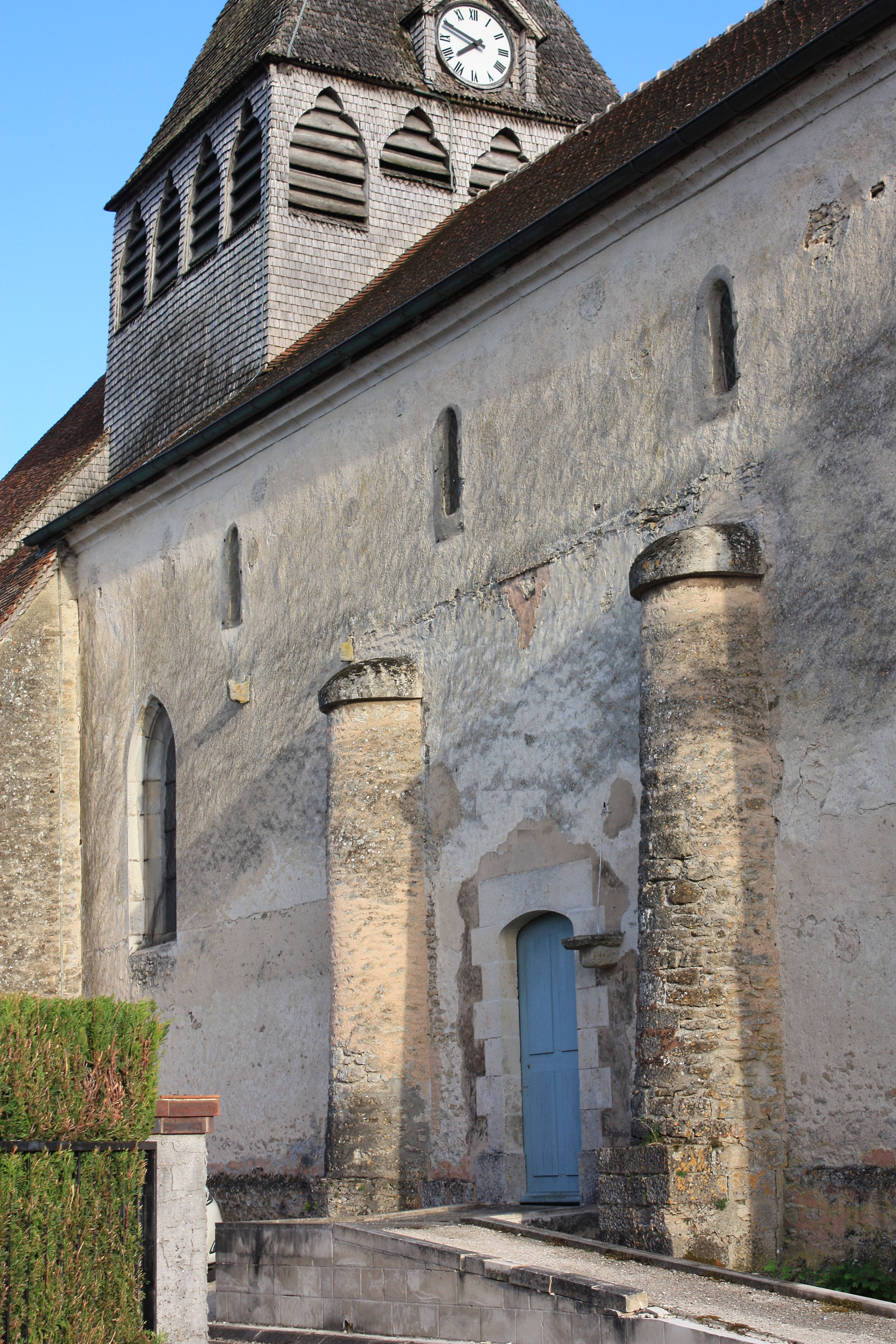 La nef romane de l'église de Chappes vue du Nord-Ouest.